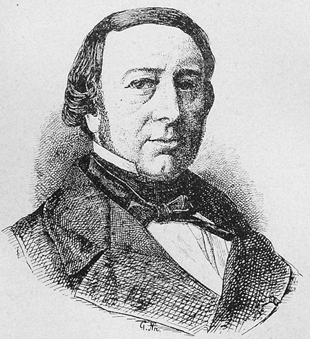 Onésime Delafond